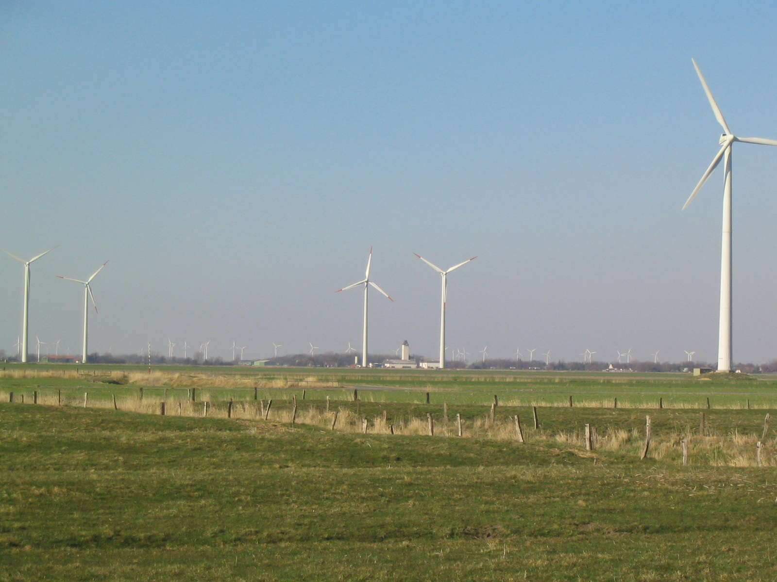 Wind turbines close to Poppenwurth, Dithmarschen.